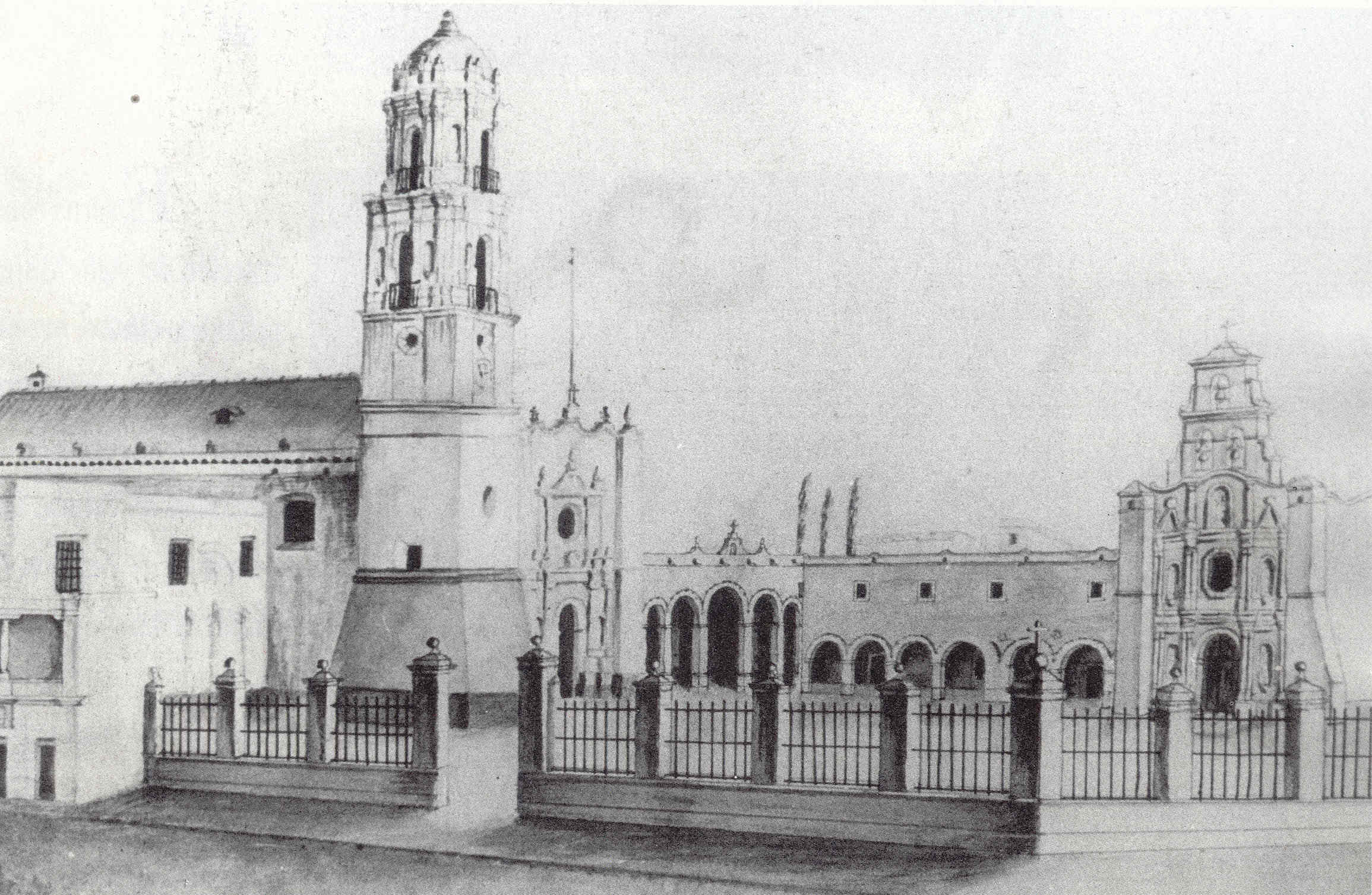 Dibujo del antiguo complejo Conventual de la Asunción de María construido por los franciscanos en Toluca de San José este dibujo fue realizado aproximadamente 10 años después de que se demoliera el convento ahora solo sobrevive la capilla que esta a la derecha.